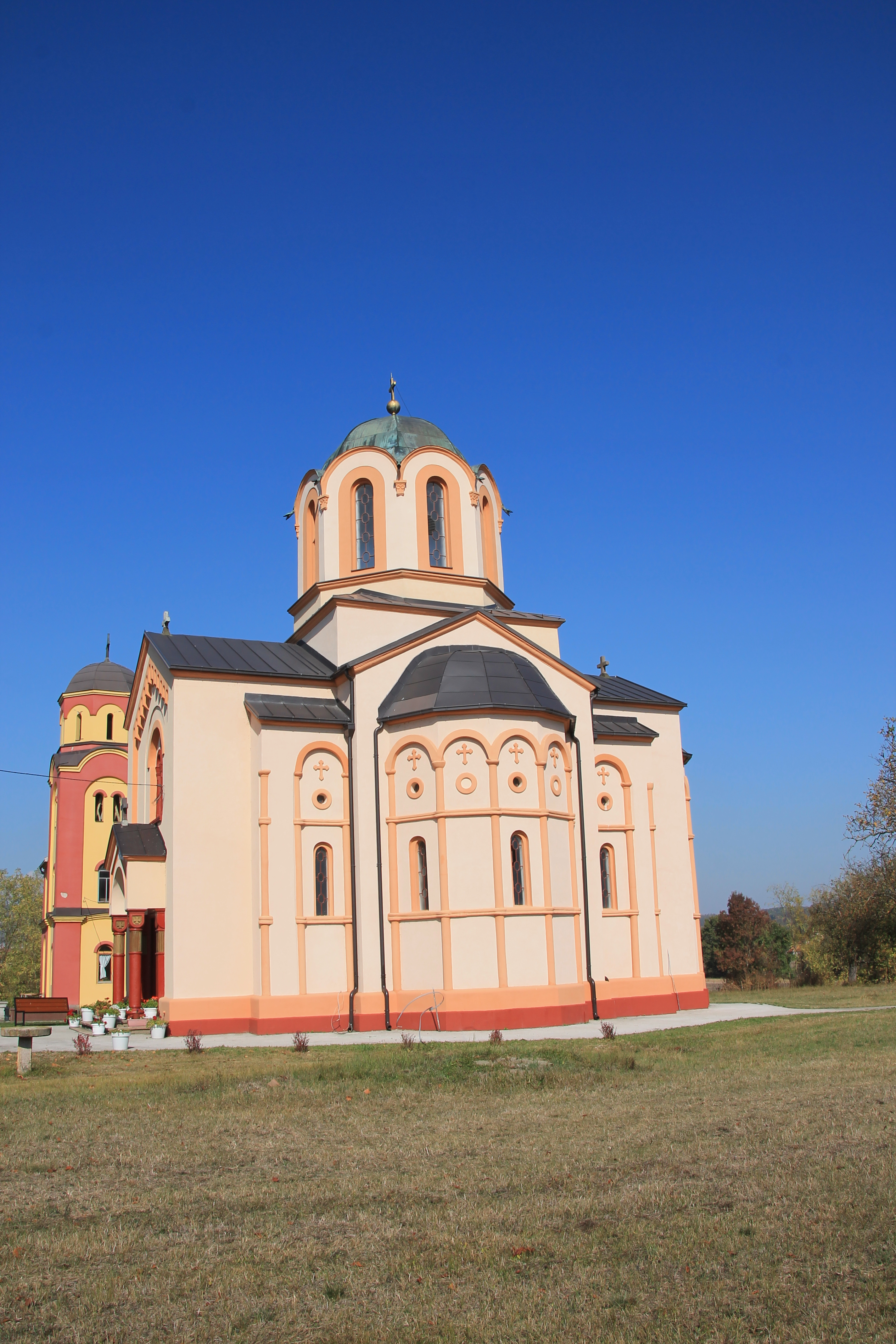 Crkva Sv. Marka (Bresnica)